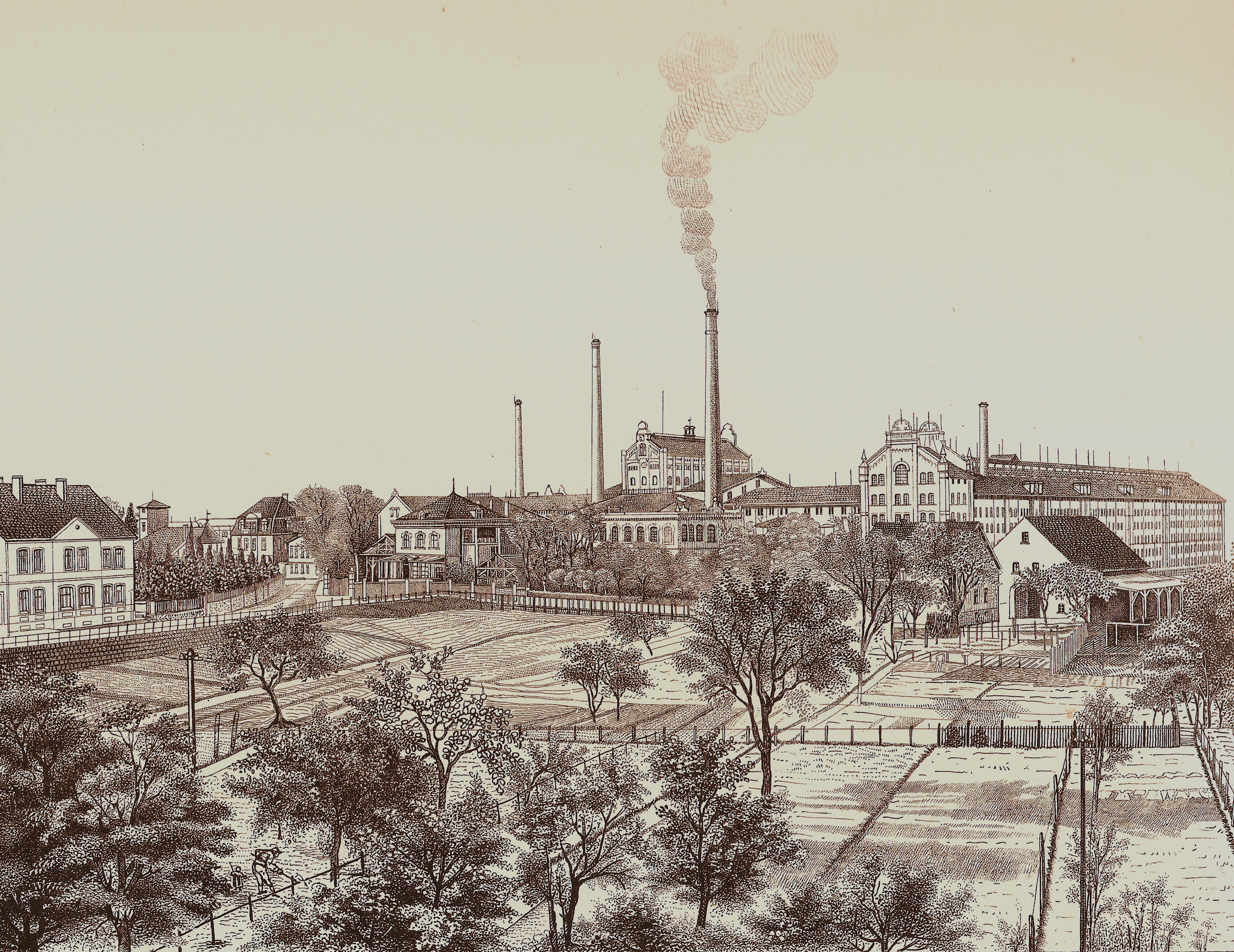 Photografik Hoffmann's Stärkefabriken Ansicht ca. 1890